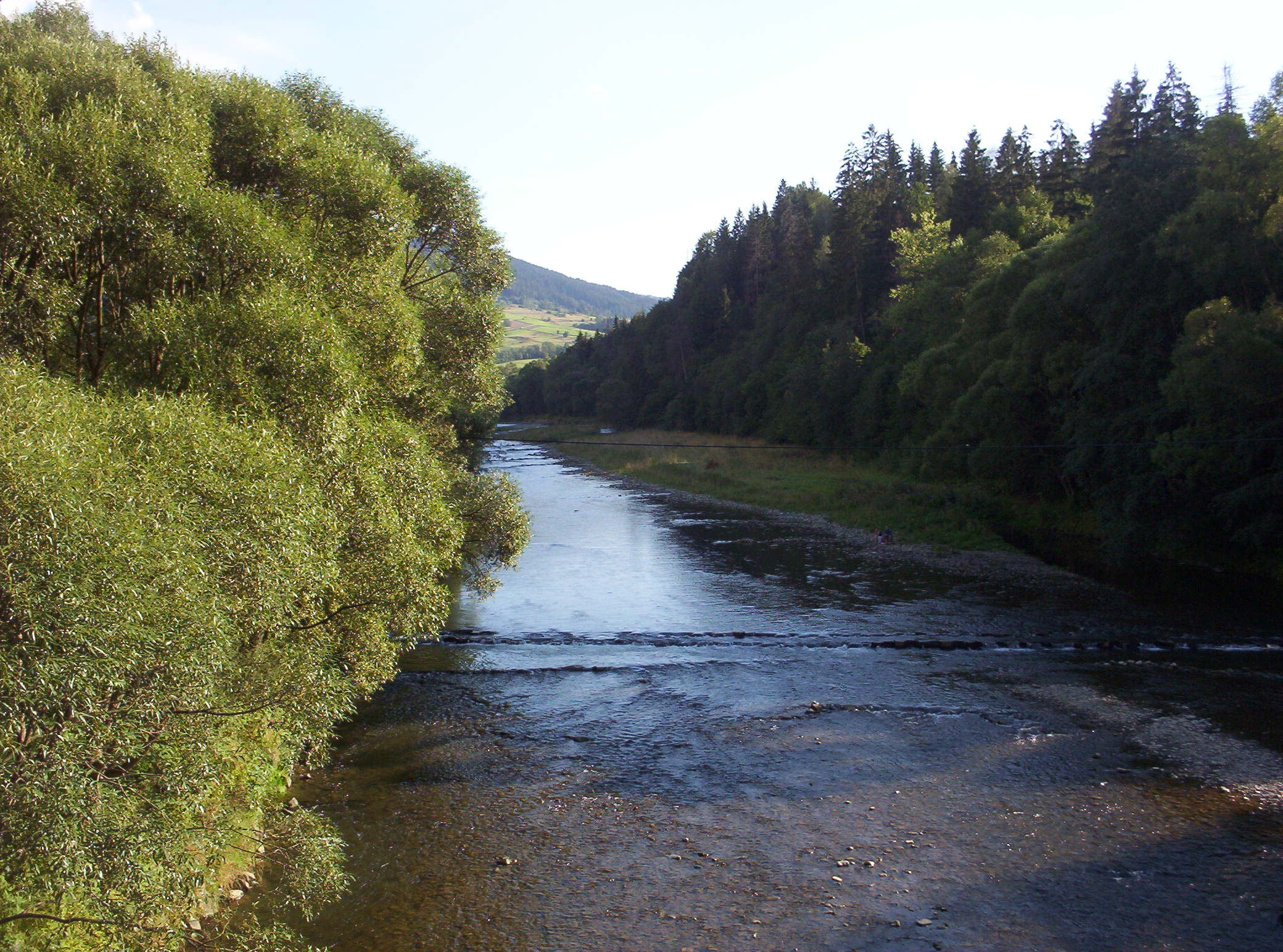 Soła w Milówce widziana z mostu na DK69, sierpień 2004